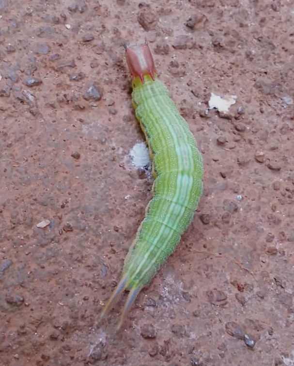 Foto colorida da Lagarta de Opsiphanes invirae no solo. Fotografado em Goiânia-Goiás-Brasil.